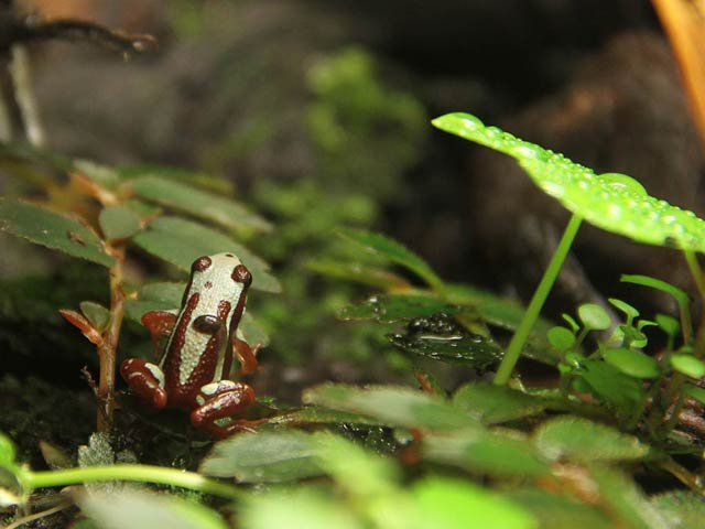 Mâle Tricolor Highland transportant un tétard